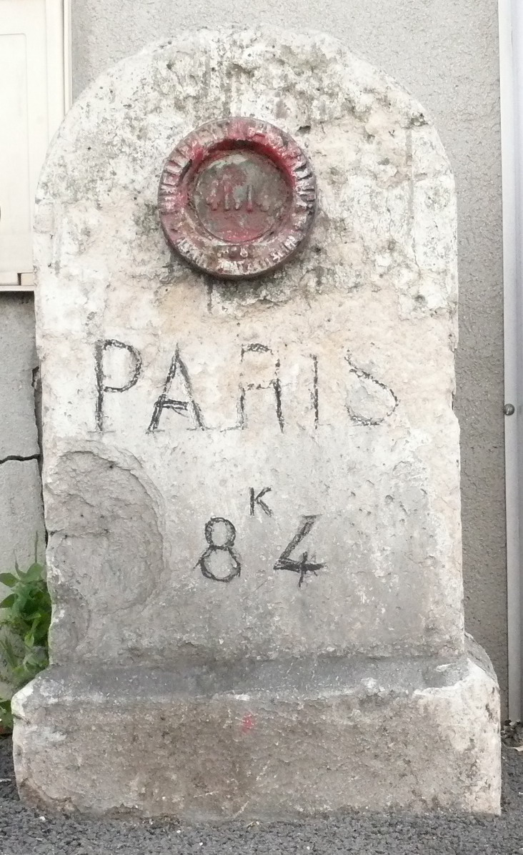 Borne kilométrique sur l'ancien tracé de la RN 301 à Stains (Seine Saint Denis - France), rue Carnot